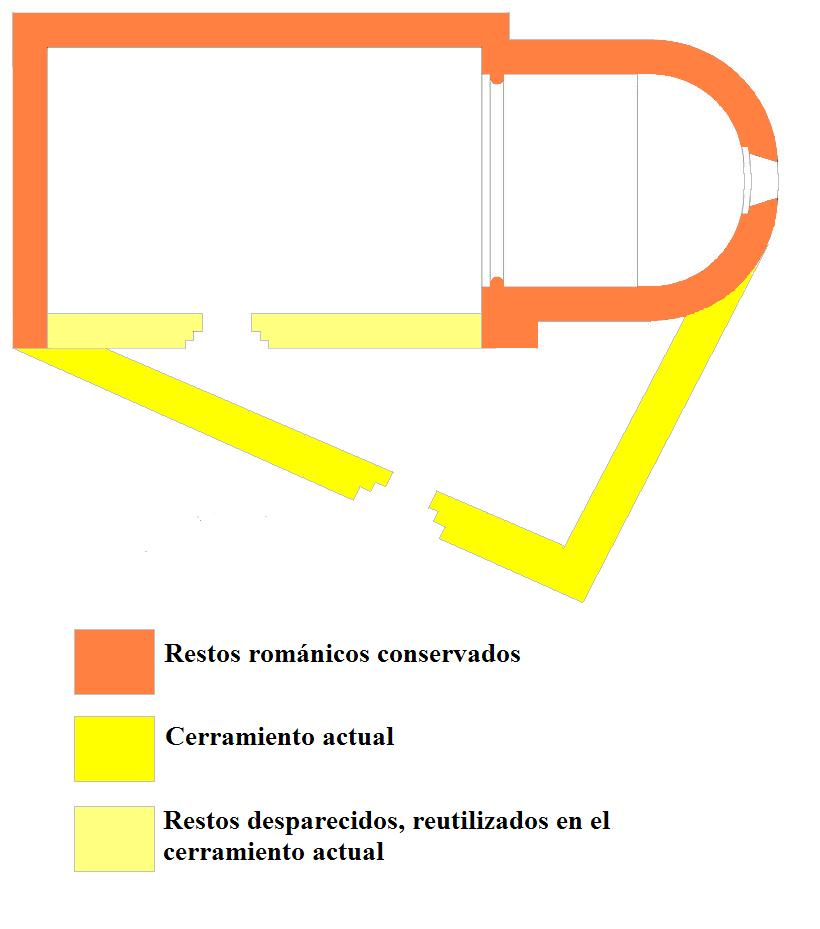 Planta de la Iglesia de la Santa Cruz (Serón de Nágima)